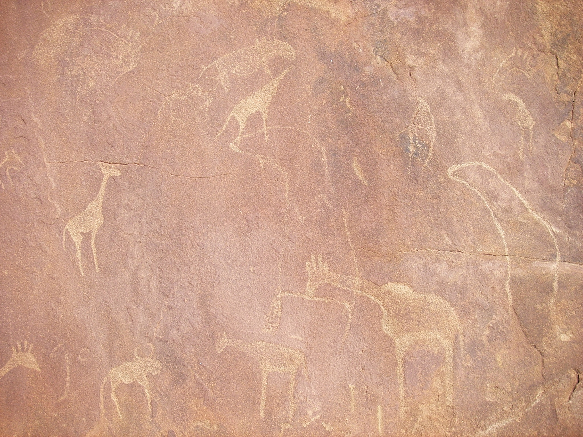 Rock Painting Twyfelfontein